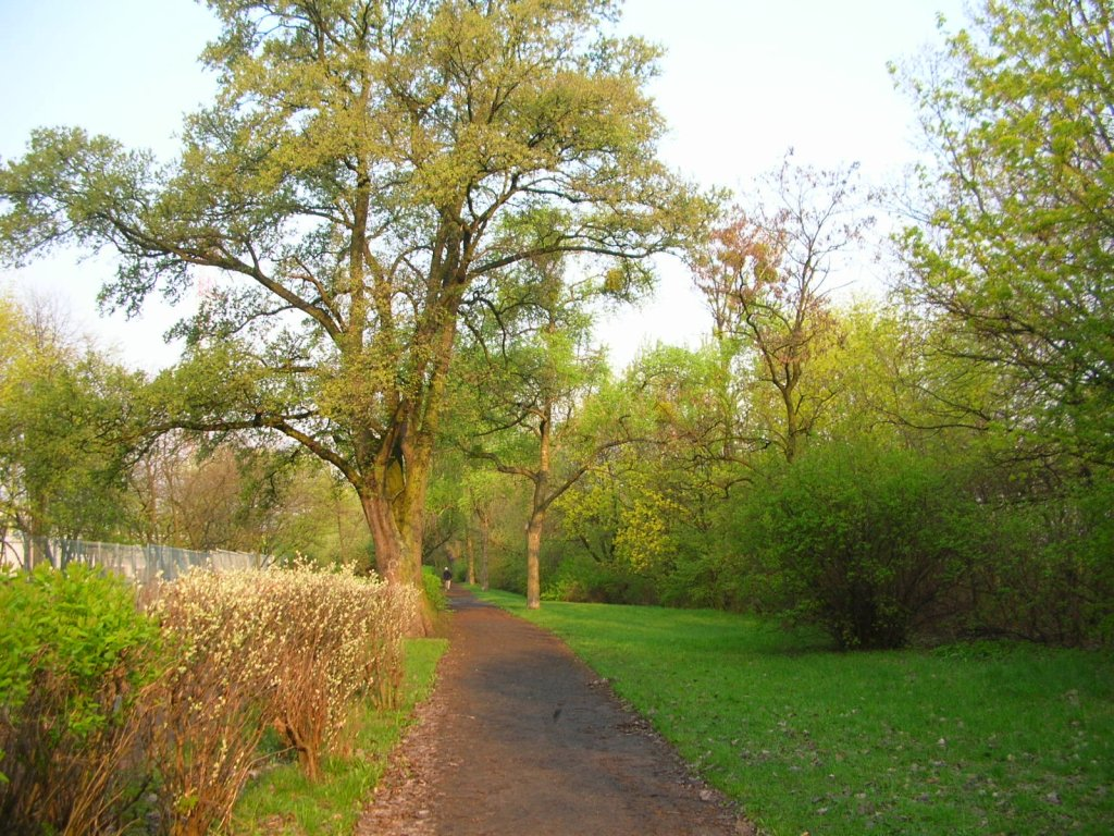 Park Wzgórze Wolności w Bydgoszczy